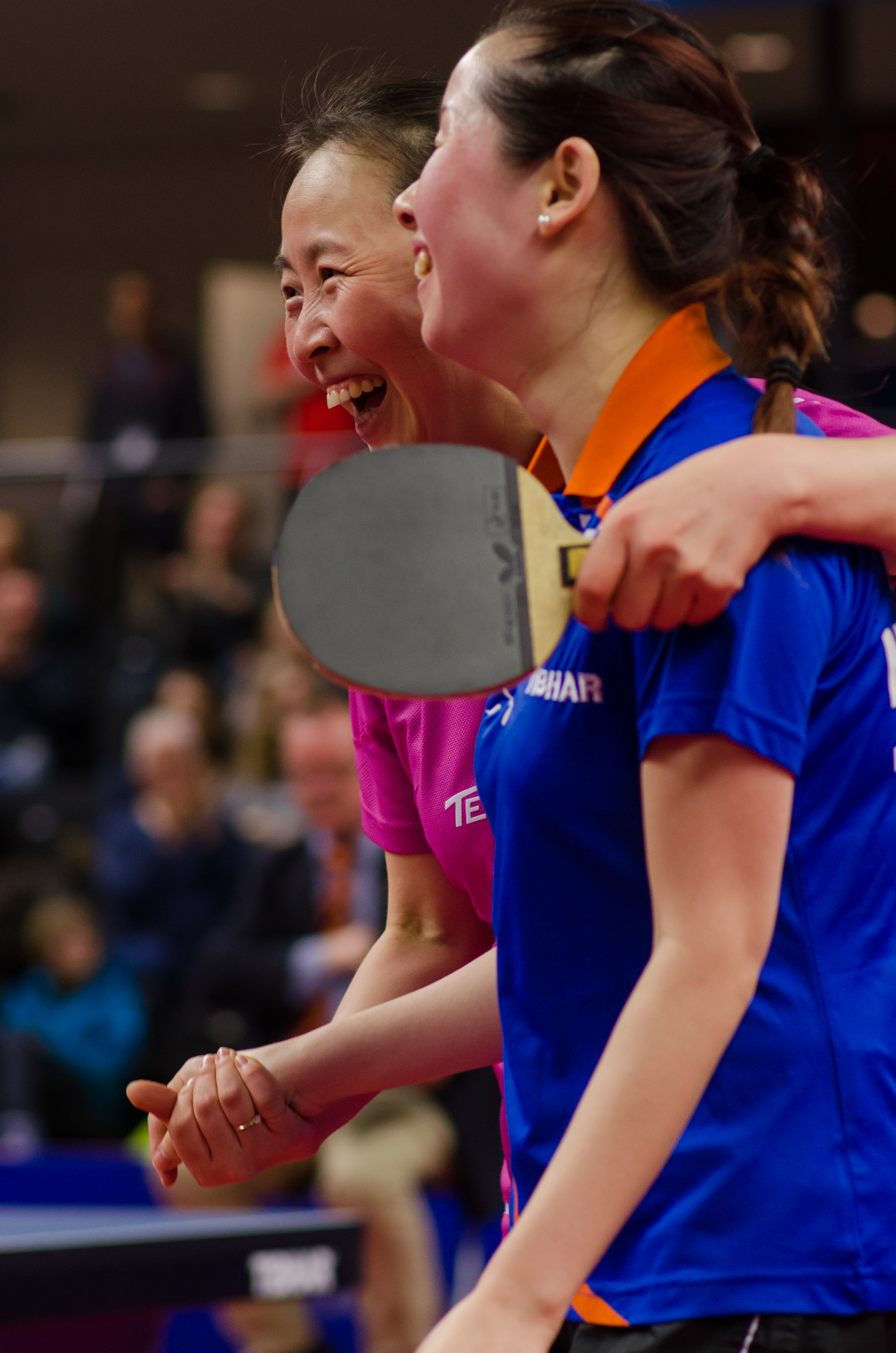 _DSC5469